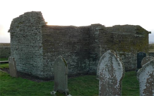 St. Mary's Chapel, Wyre, Orkney Islands